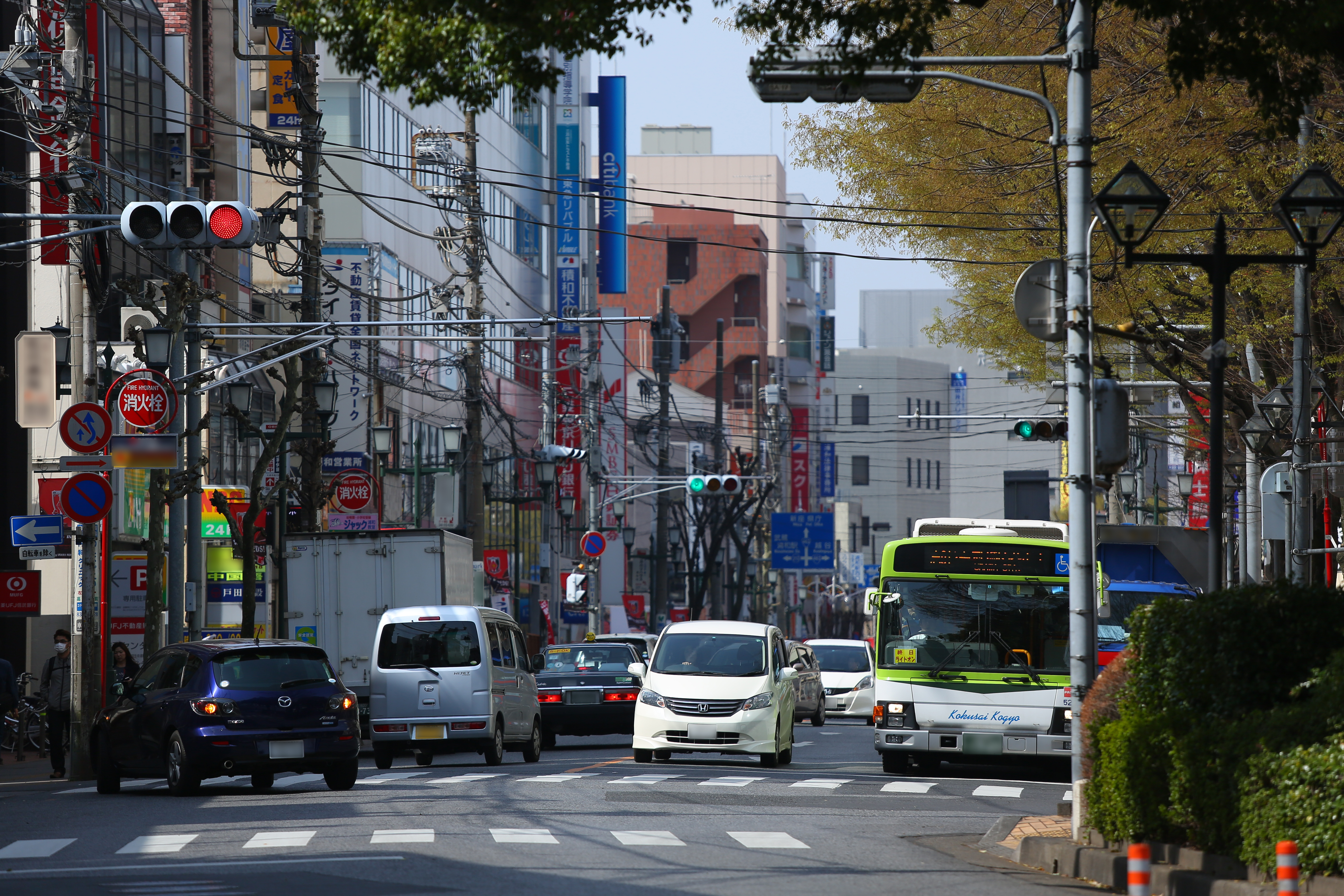 浦和駅西口県庁通り